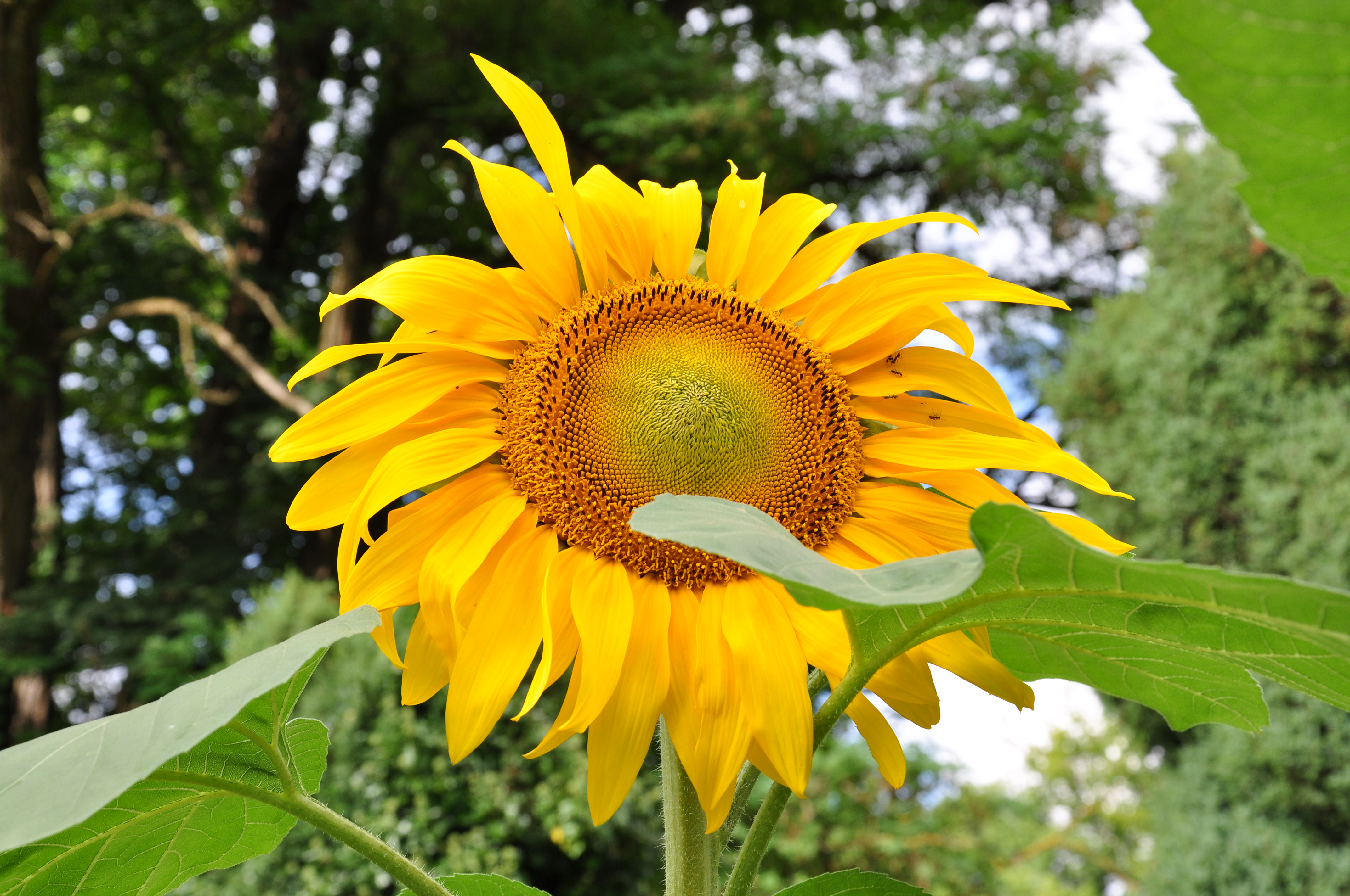 Botanischer Garten der Universität Zürich in Zürich-Weinegg (Switzerland) : Helianthus annuus